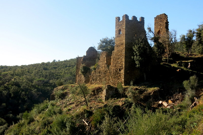 Castell de Vila-Romà a Palamós (Baix Empordà) - Catalunya